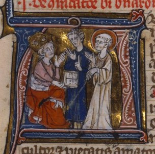 Saint Bernard et Conrad III